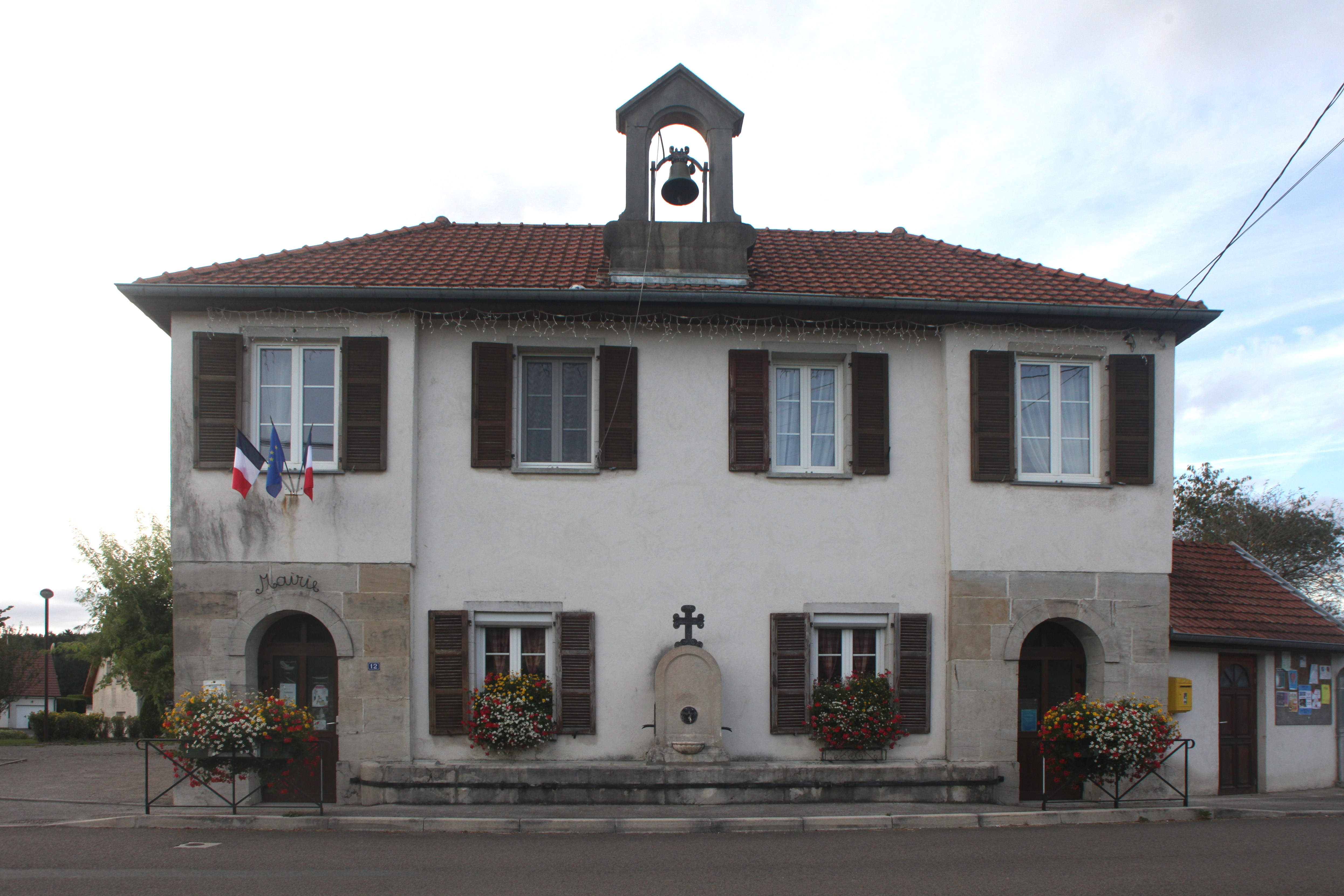 Mairie du Gratteris (Doubs).